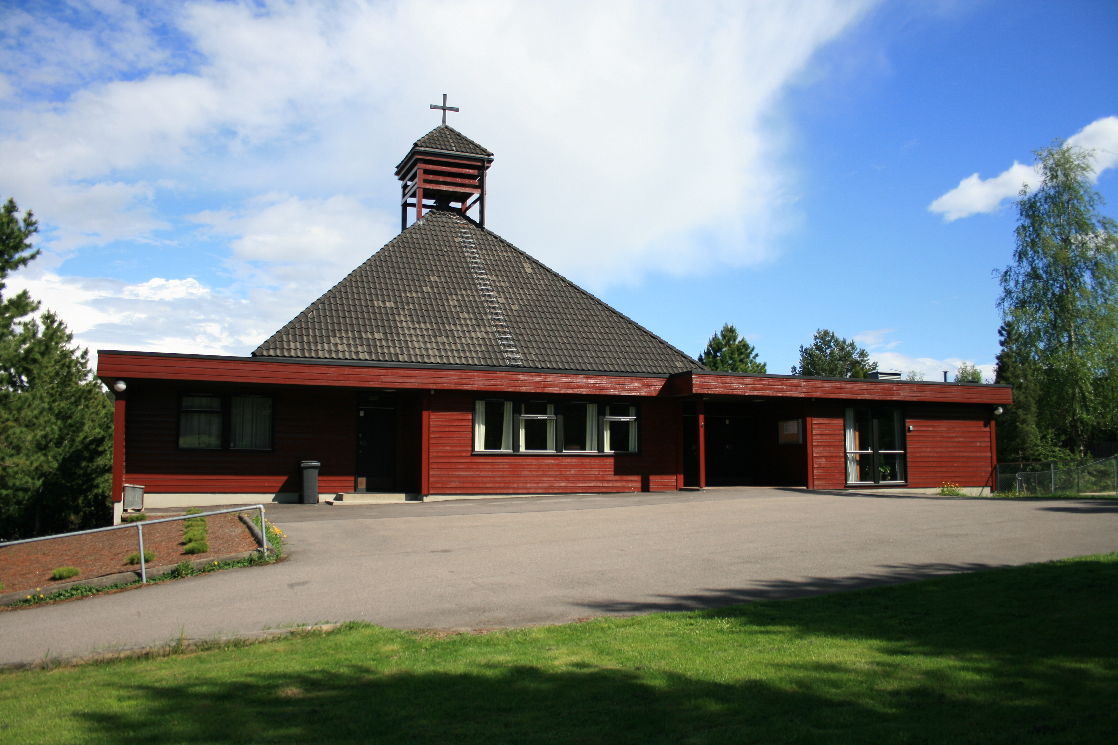 Søndre Skøyen kapell er en arbeidskirke fra 1980. Den ligger like ved Søndre Skøyen gård i Bydel Østensjø i Oslo.